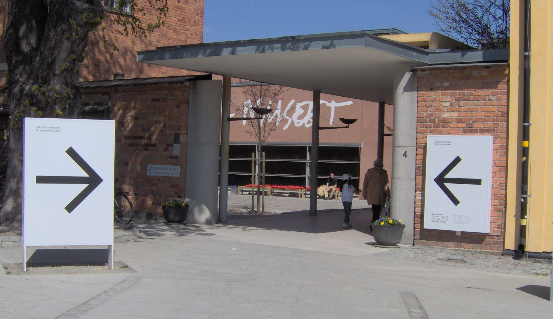 Moderna museets ingång 2006